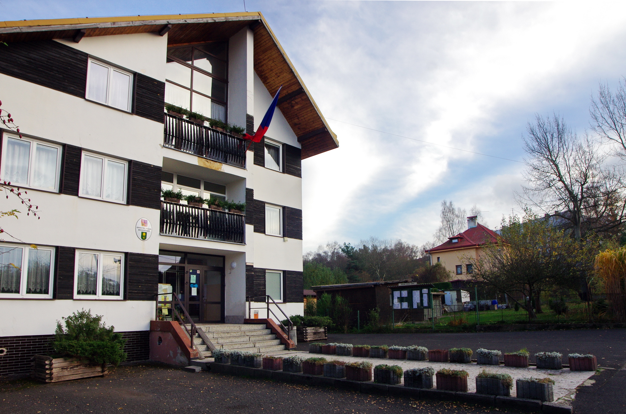 obec Bukovany, okres Sokolov